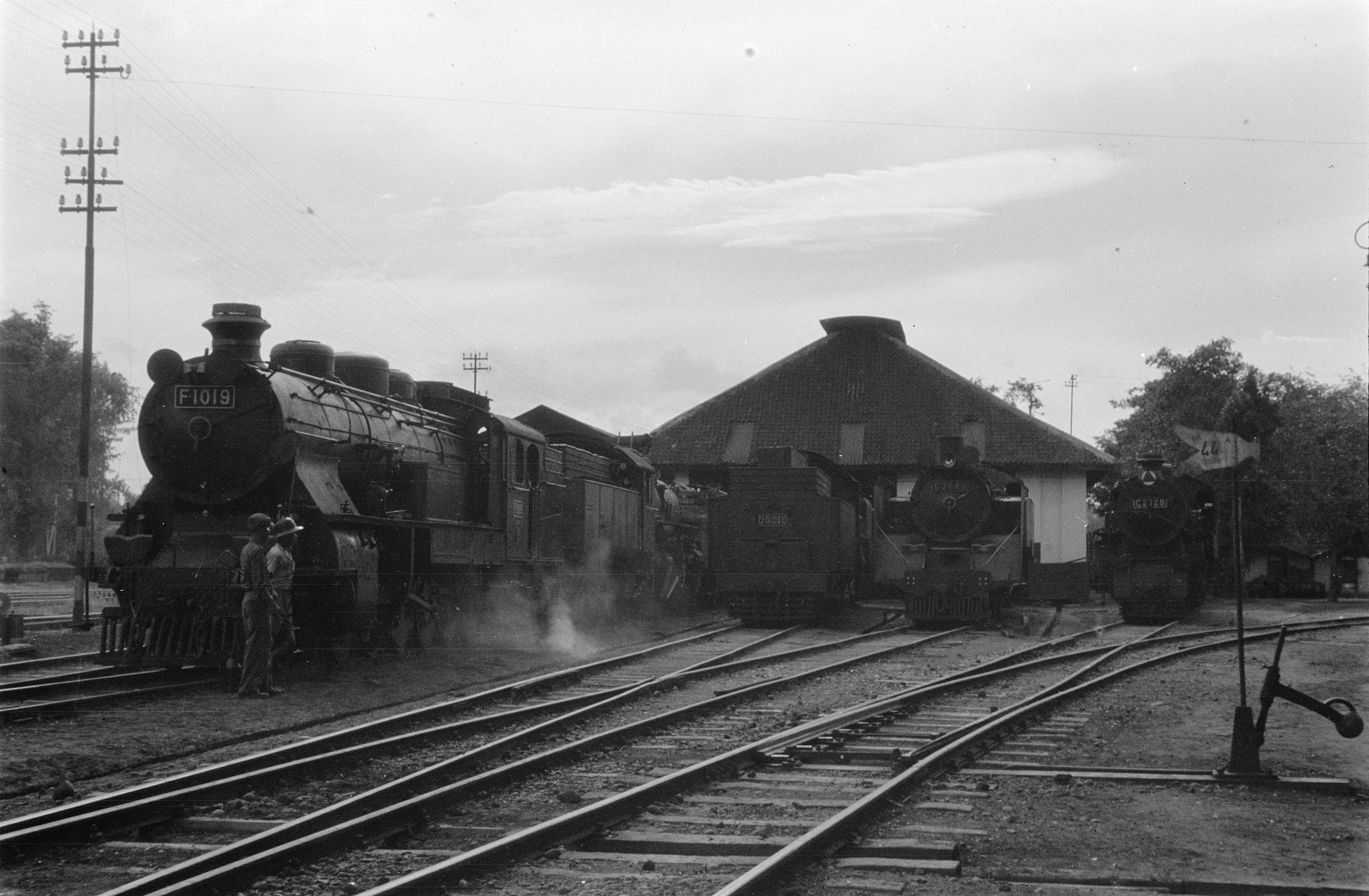 Collectie / Archief : Fotocollectie Dienst voor Legercontacten Indonesië Reportage / Serie : [DLC] Madioen; spoorwegwerkplaats Beschrijving : Stoomlocomotieven Datum : 10 februari 1949 Locatie : Indonesië, Nederlands-Indië Fotograaf : Kellenbach, F.C. / DLC Auteursrechthebbende : Nationaal Archief Materiaalsoort : Negatief (zwart/wit) Nummer archiefinventaris : bekijk toegang 2.24.04.02 Bestanddeelnummer : 3377